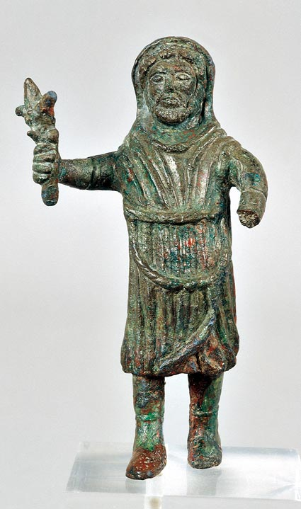 Figurine en bronze représentant Jupiter (3e siècle après J.-C.).